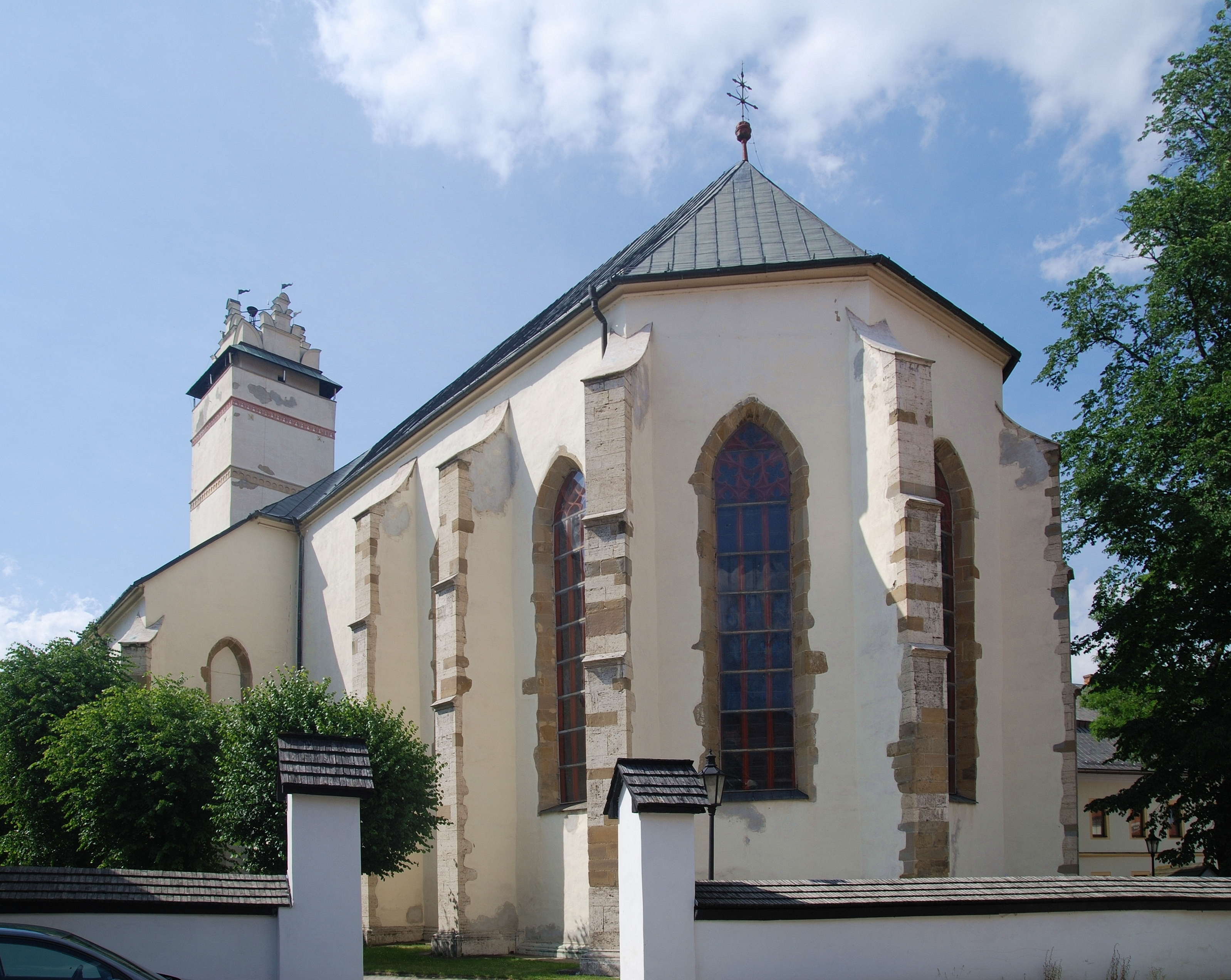 wieś Kežmarok